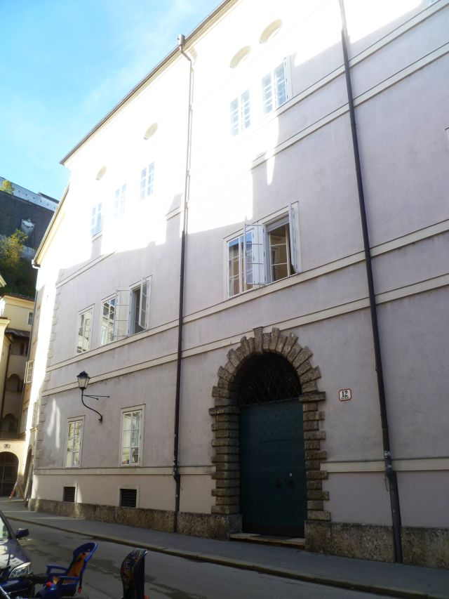 ehem. Domdechantei und Trakl-Brunnen